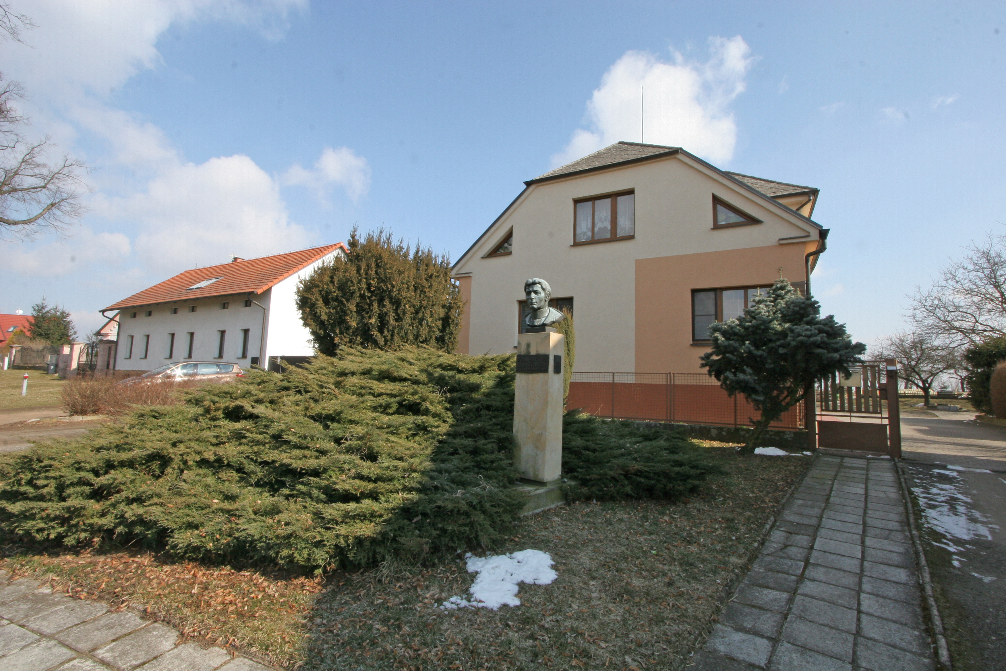 Vlčkovice čp. 36